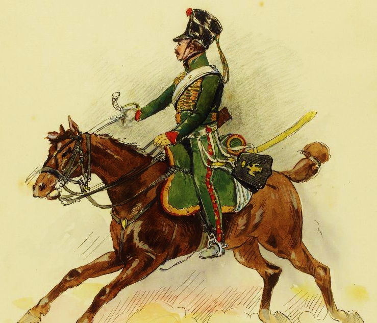 Chasseur à cheval de la Jeune Garde au galop, en tenue de 1813 à 1814.